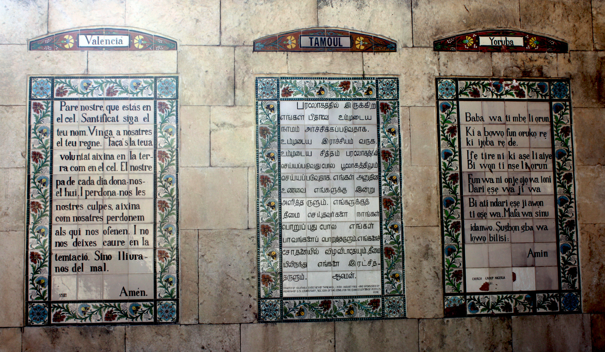 தமிழ் மொழியில் (பிற மொழிகளுடன்) கிறித்து கற்பித்த செபம் அடங்கிய சுவர்க் கற்பதிகை - எருசலேம், இஸ்ரவேல்